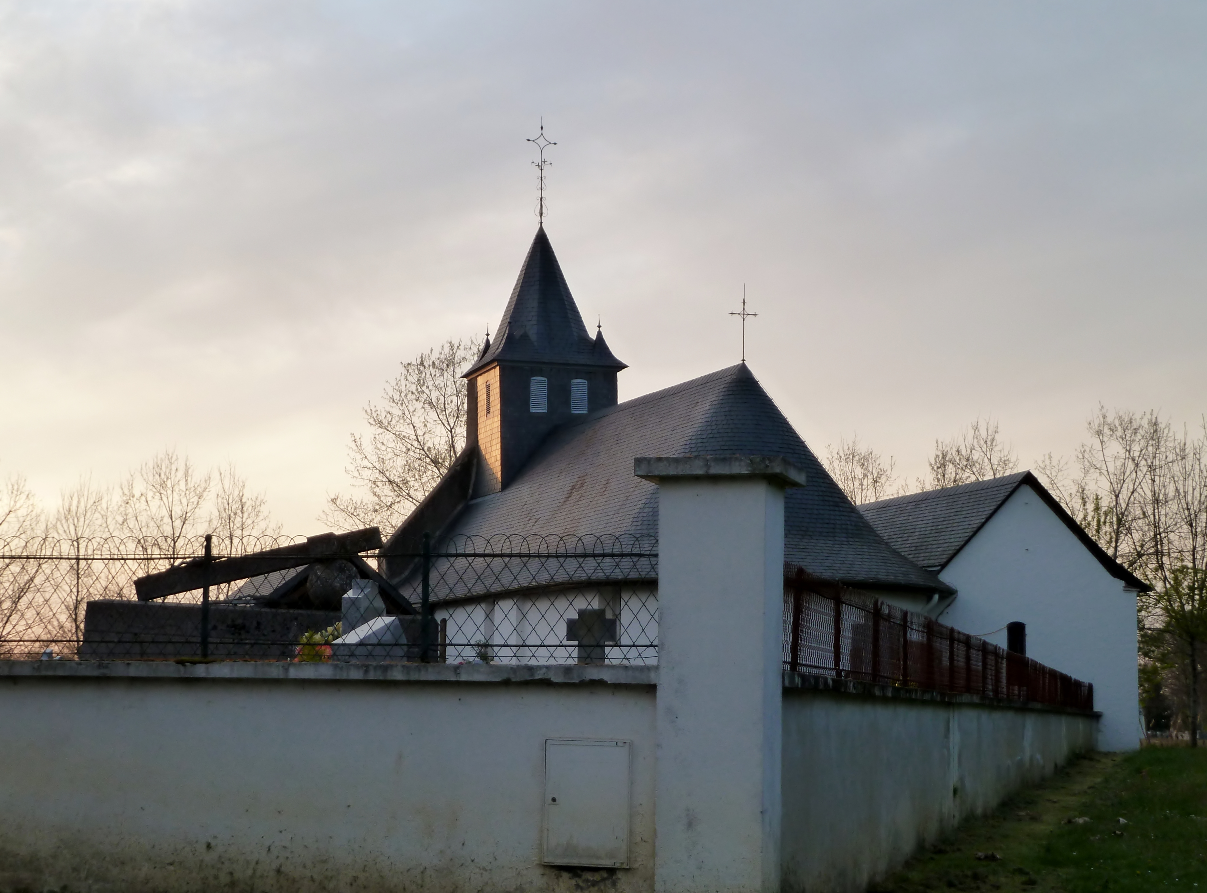 Église d'Astis